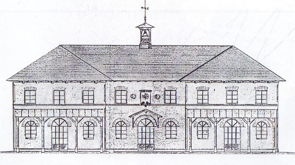 Zeichnung des ersten Buchloer Empfangsgebäudes von 1848, aus dem Stadtarchiv Buchloe